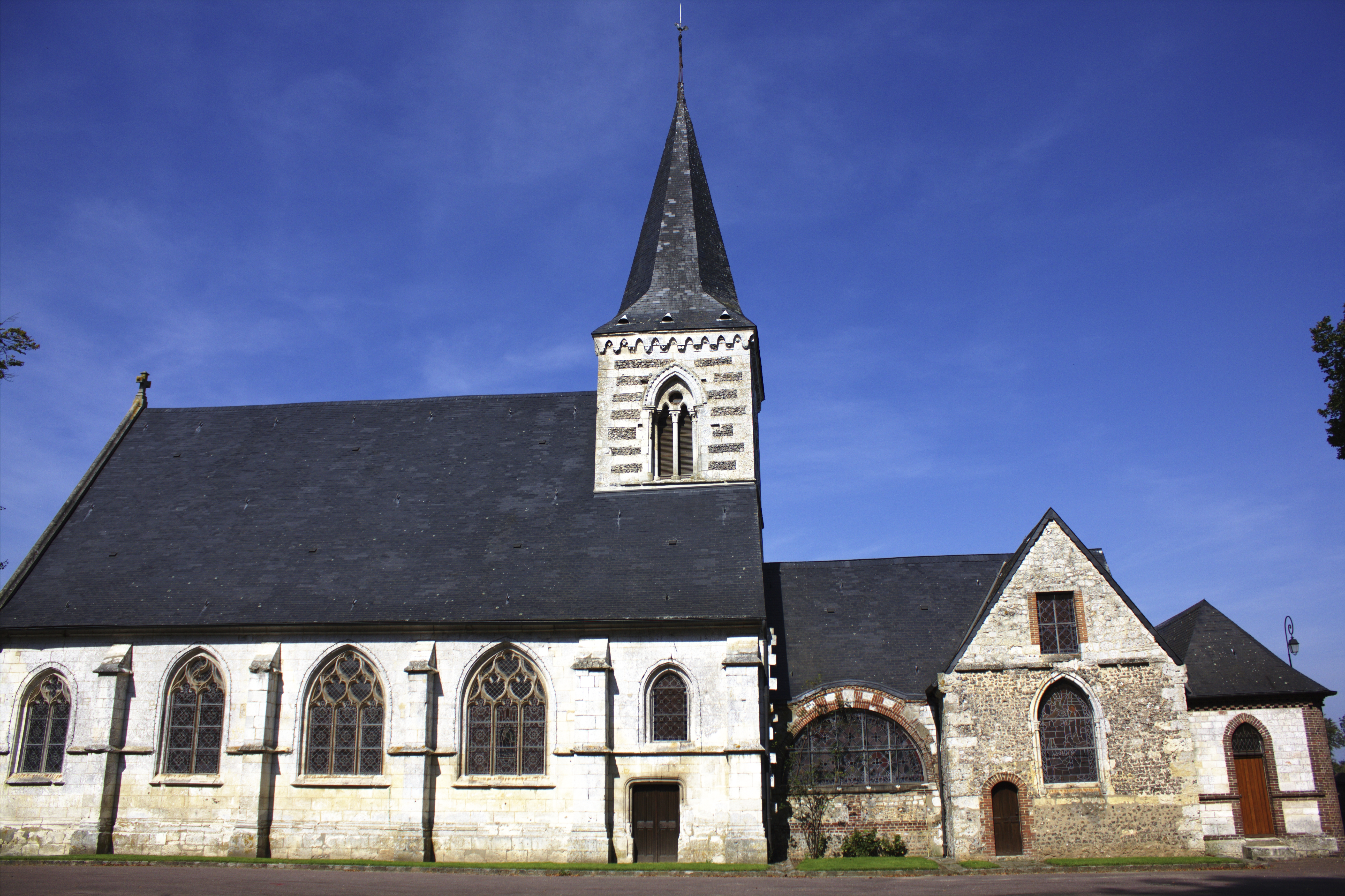 Eglise de Bouville .